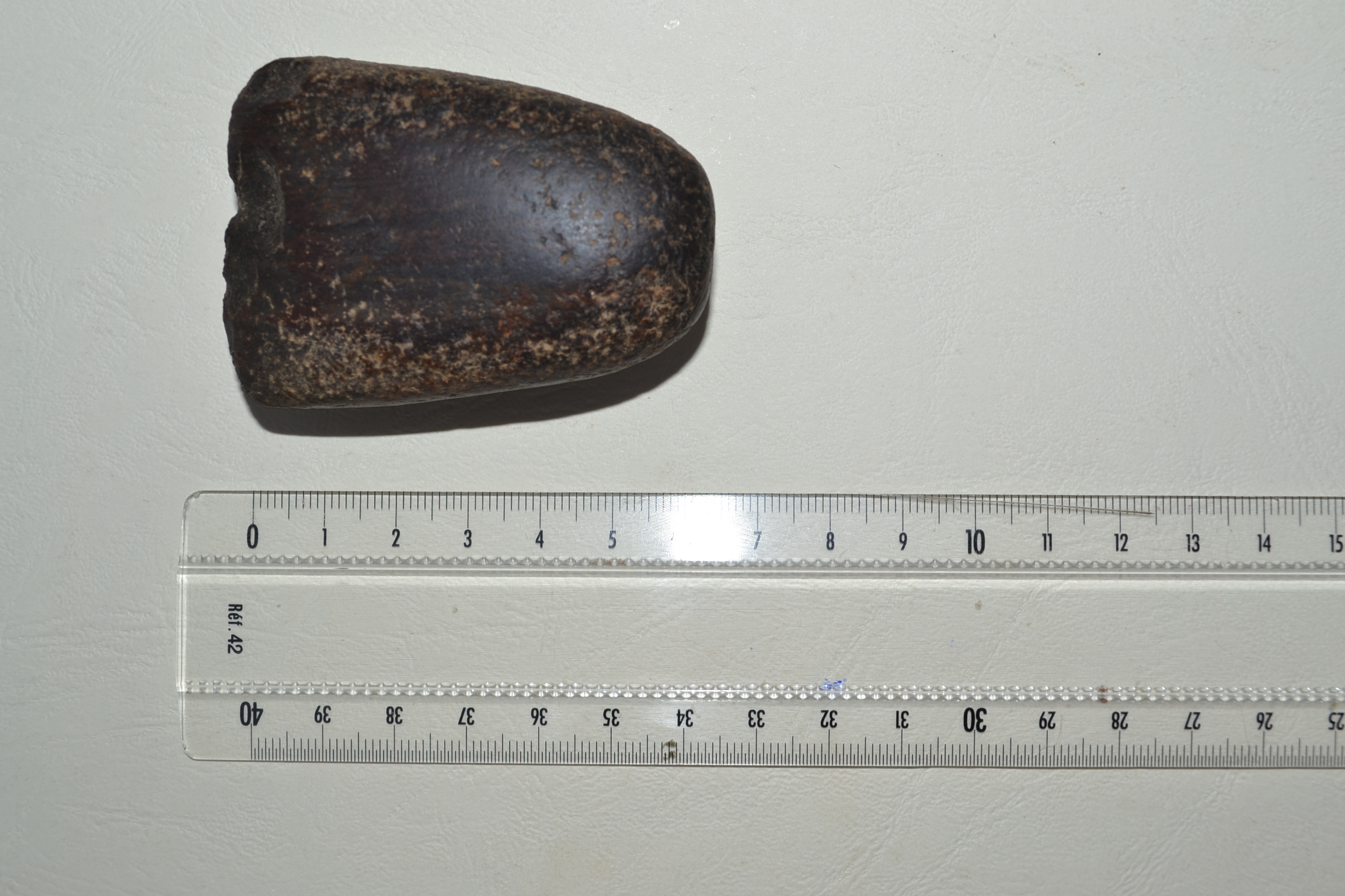 Hache néolitique pierre polie